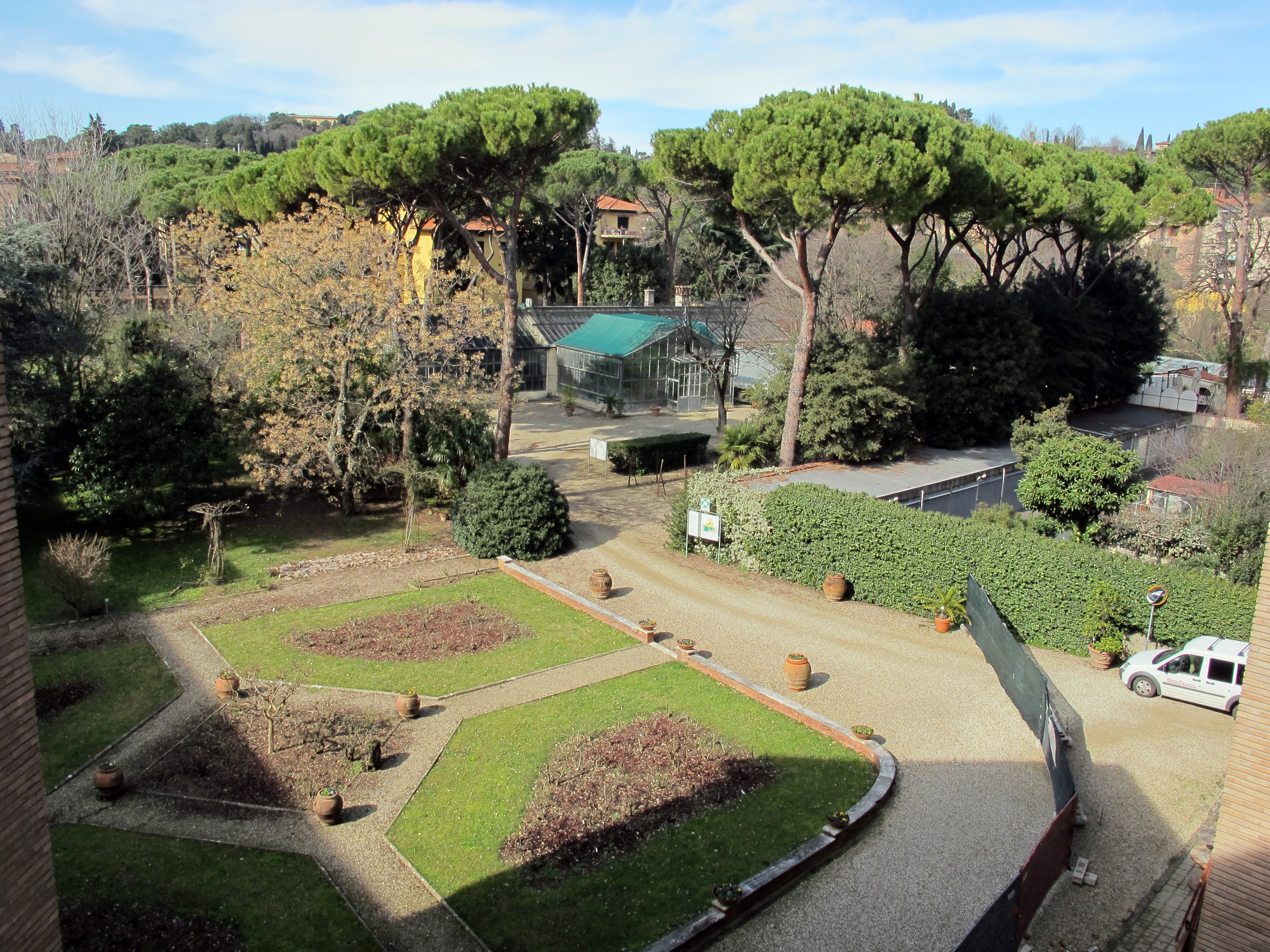 Istituto agronomico per l'oltremare, int., parco